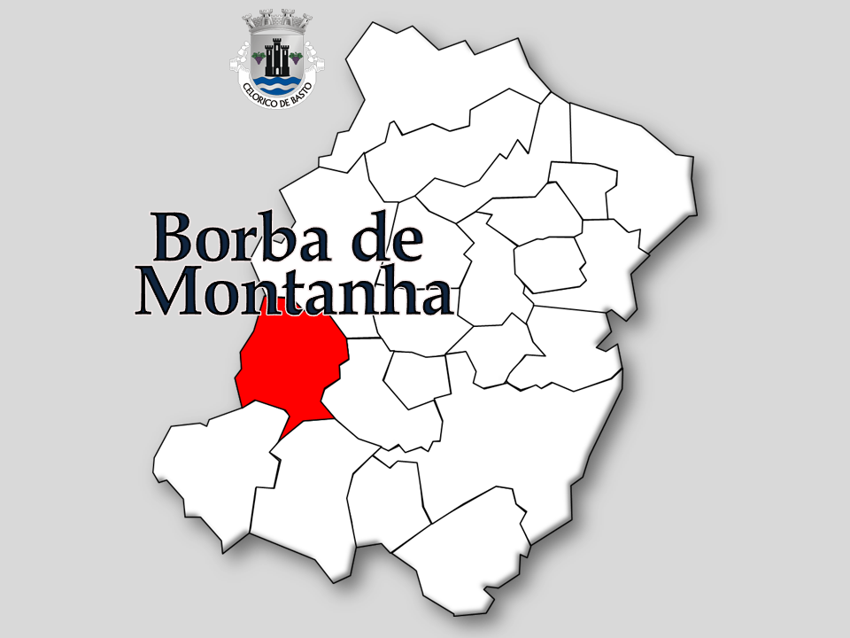 Censos 1864/2011